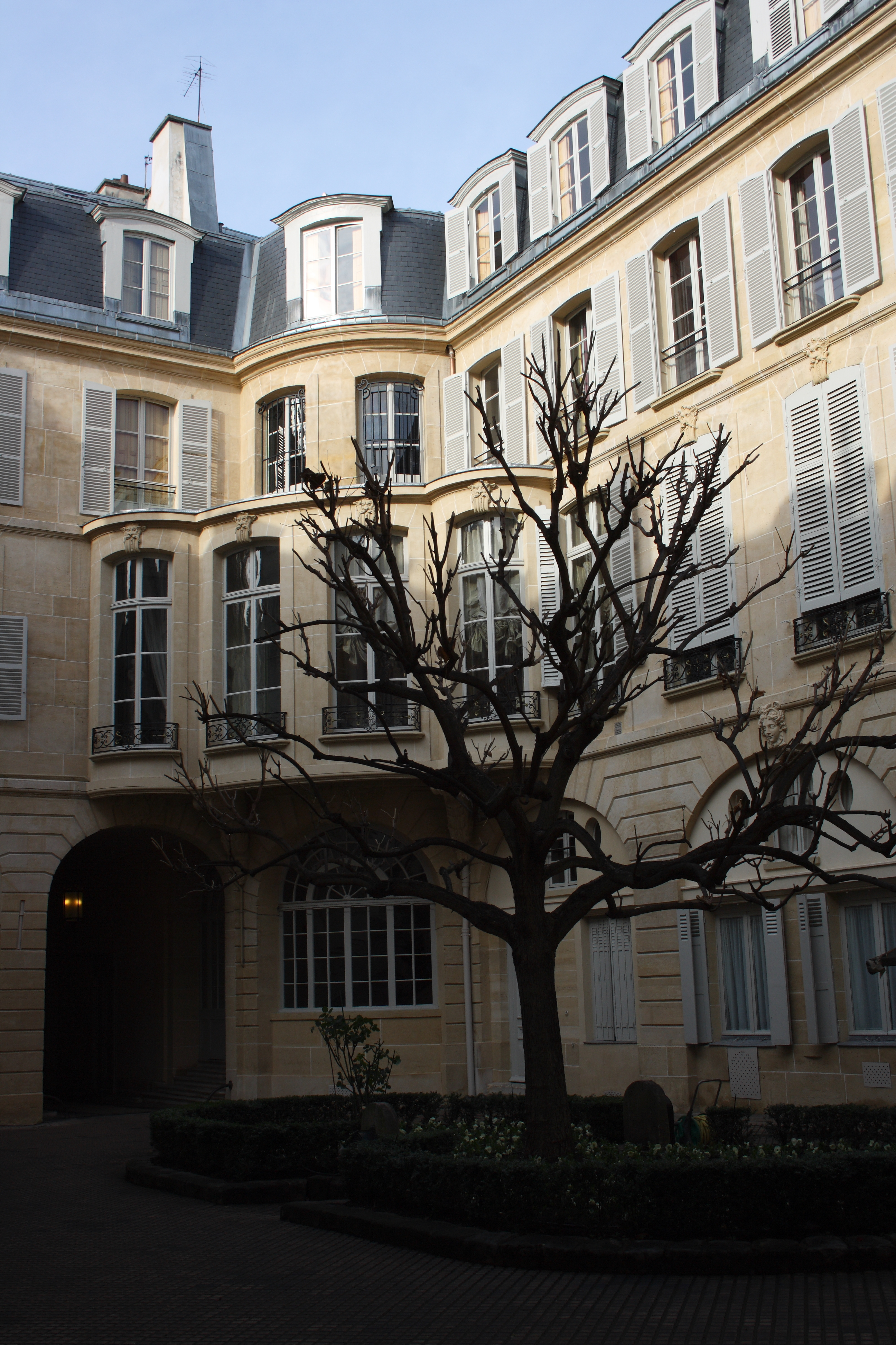 Hôtel de Salm-Dyck, 97 rue du Bac in Paris (7. Arrondissement)